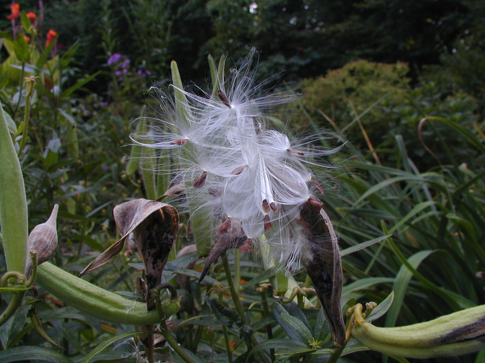 Asclepias tuberosa, open seed pods